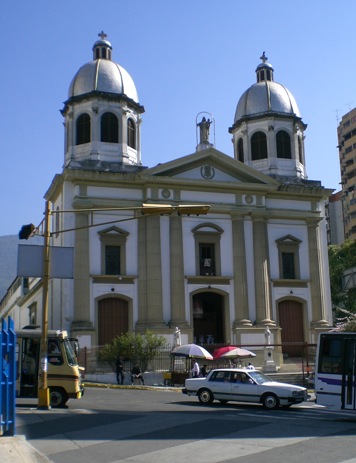 Las Mercedes Church, Caracas, Venezuela